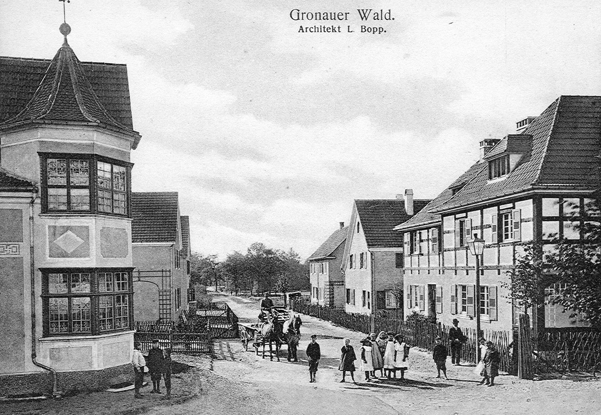 Häuser Gronauerwaldsiedlung Kreuzung Grüner Weg/Gronauer Waldweg